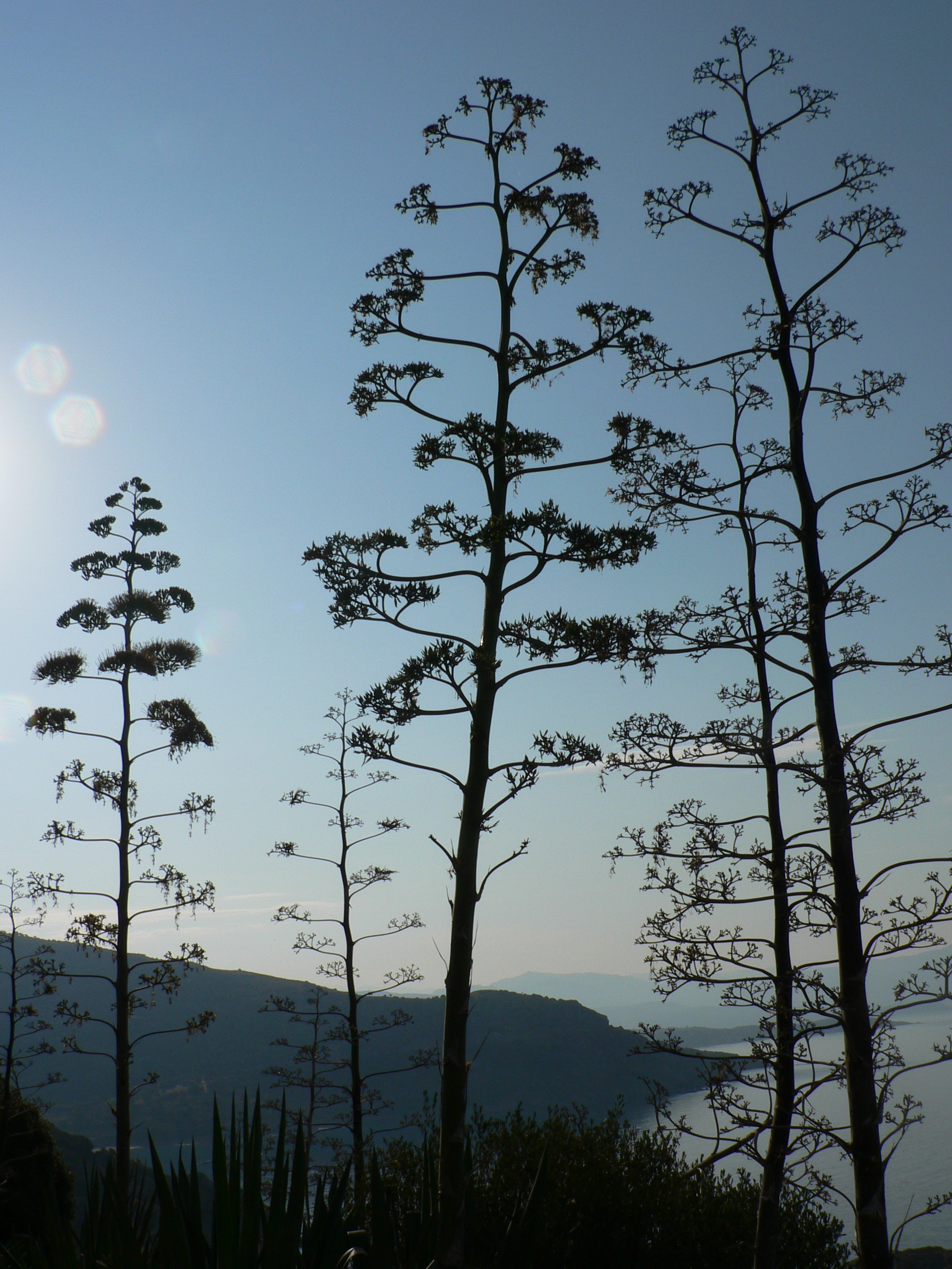 agava, Cargèse, Corsica